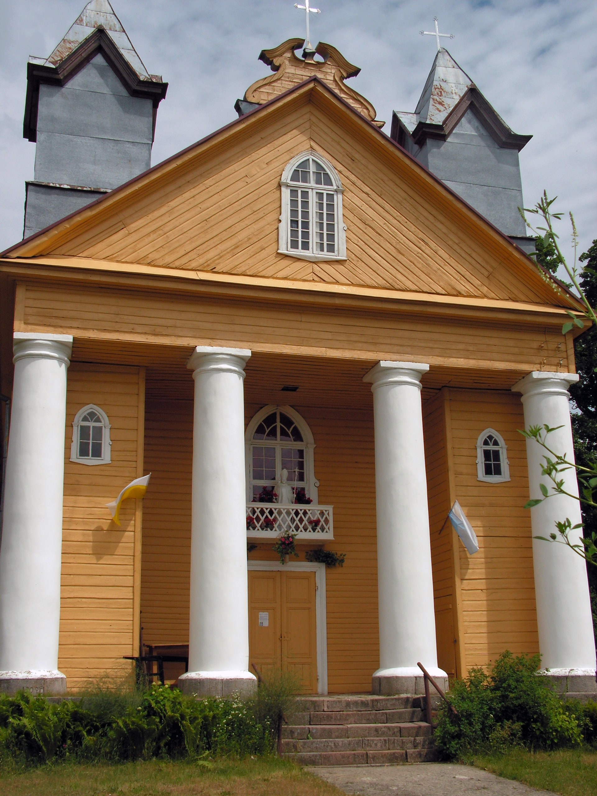 Беларуская (тарашкевіца): Касьцёл Сьвятой Тройцы ў Данюшаве (Смаргонскі раён).